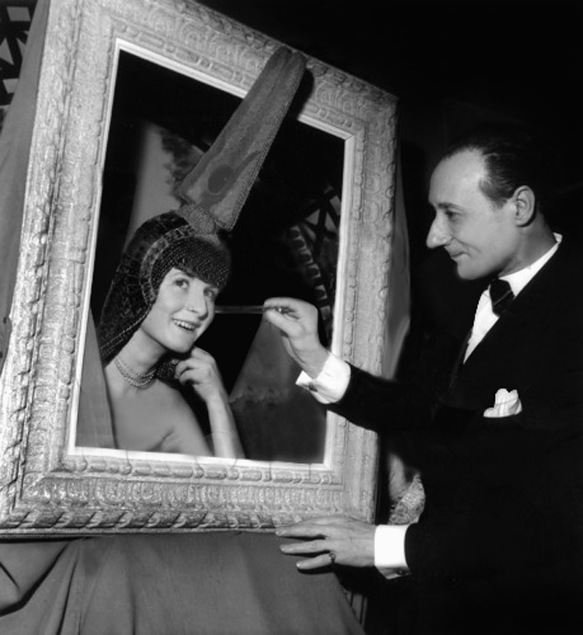 Le peintre affichiste Jean Dominique Van Caulaert